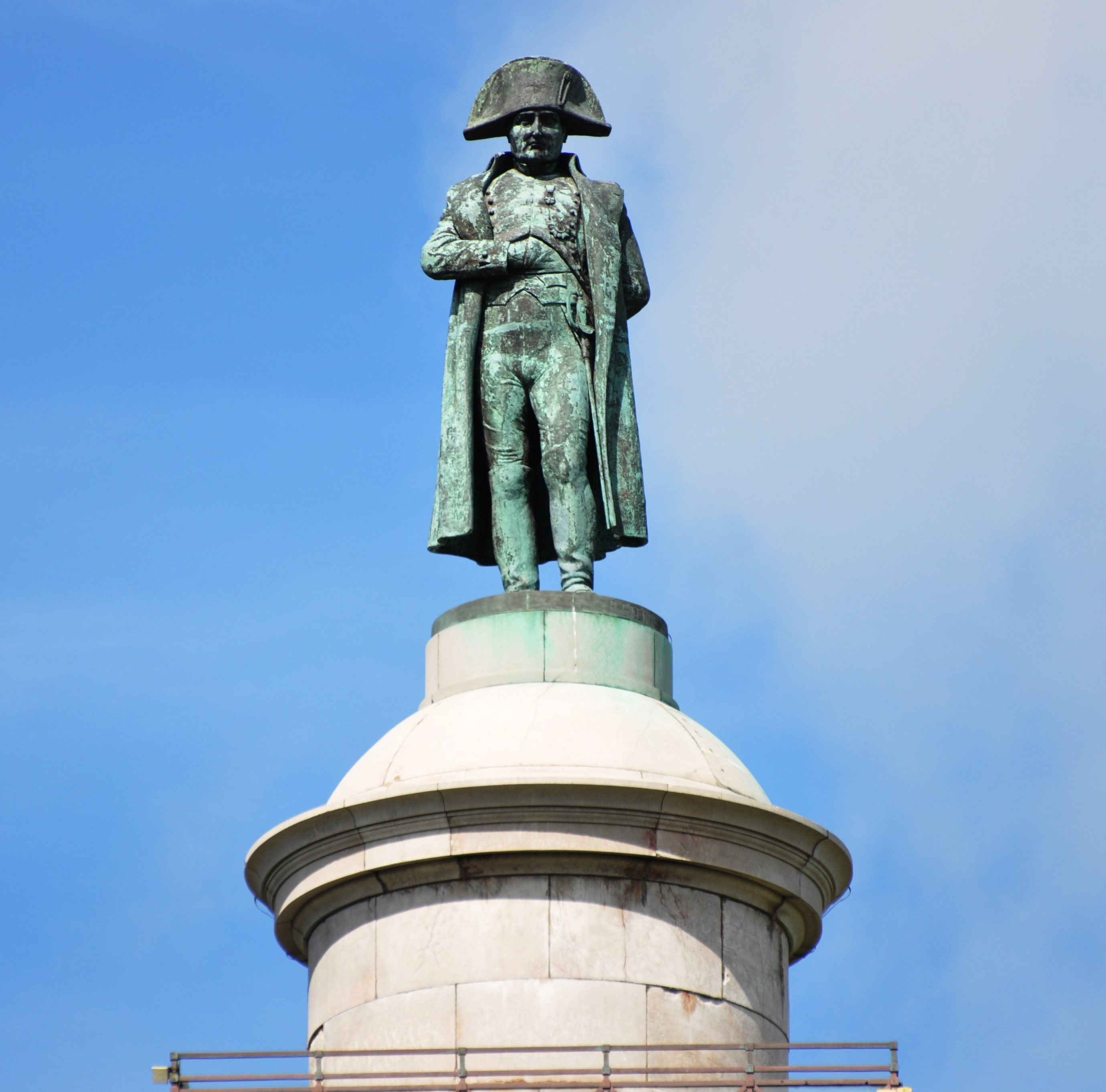 Napoleon, Colonne de la Grande Armée à Wimille